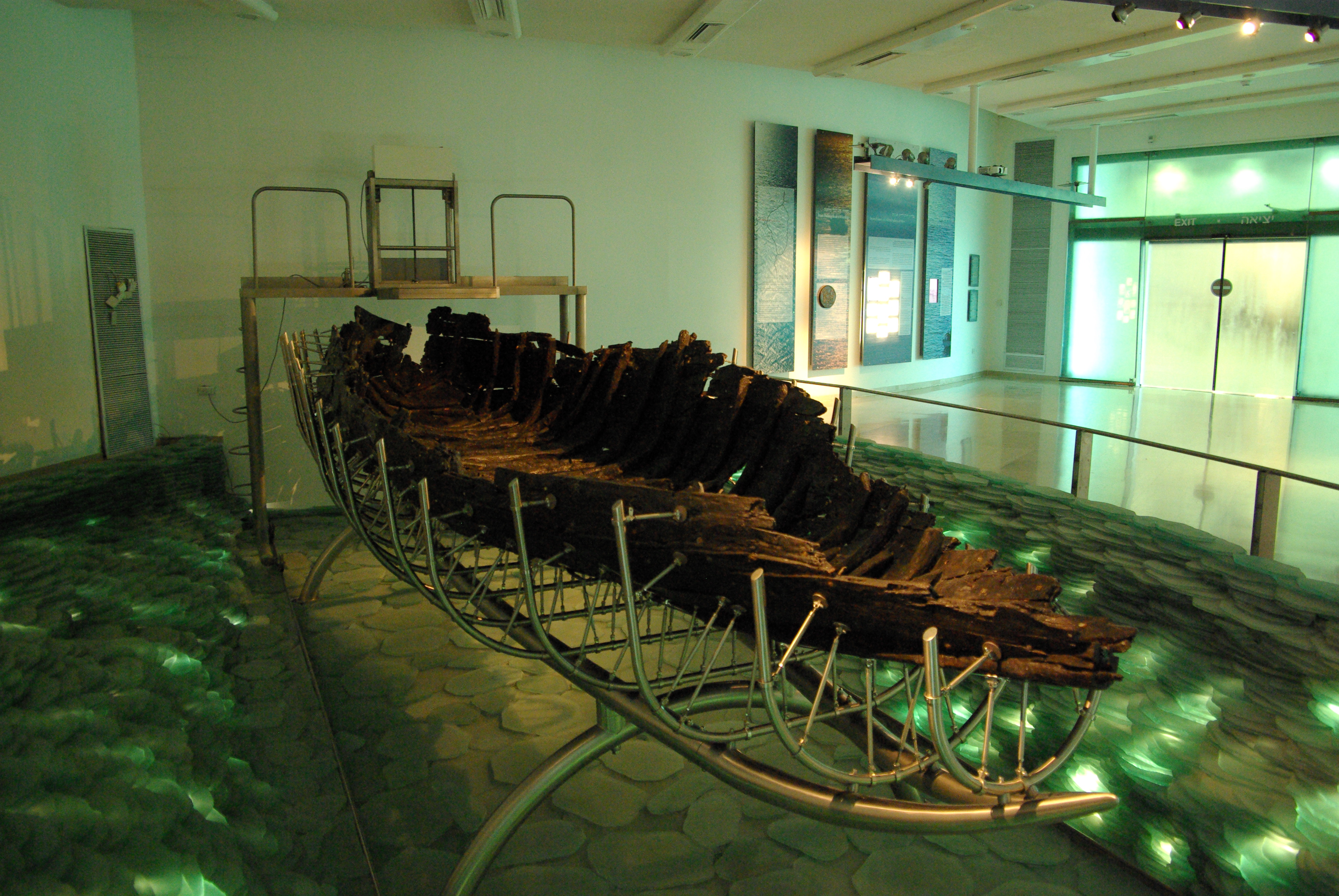 Kibbuz Ginnossar, Yigal Allon Center